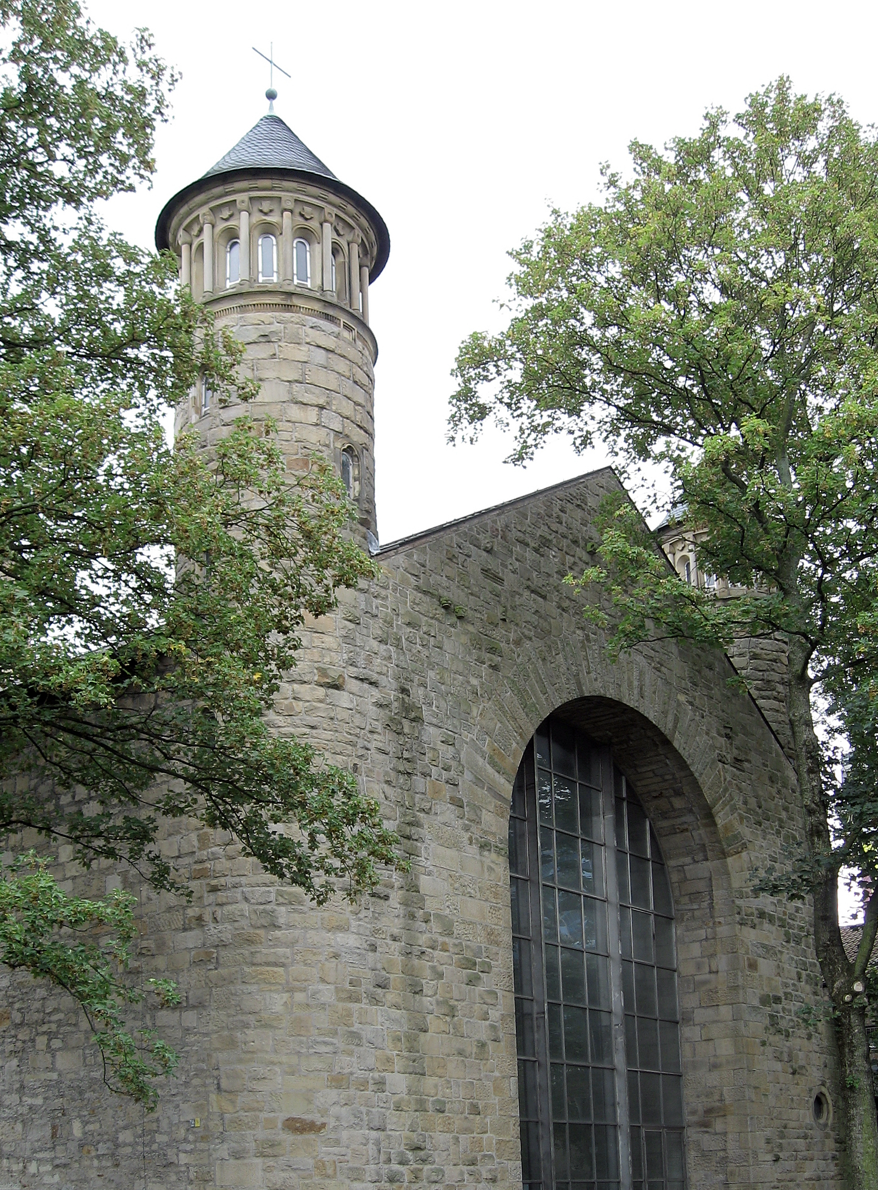 Dortmund, Bonifatius-Kirche, Westfassade, Treppentürme